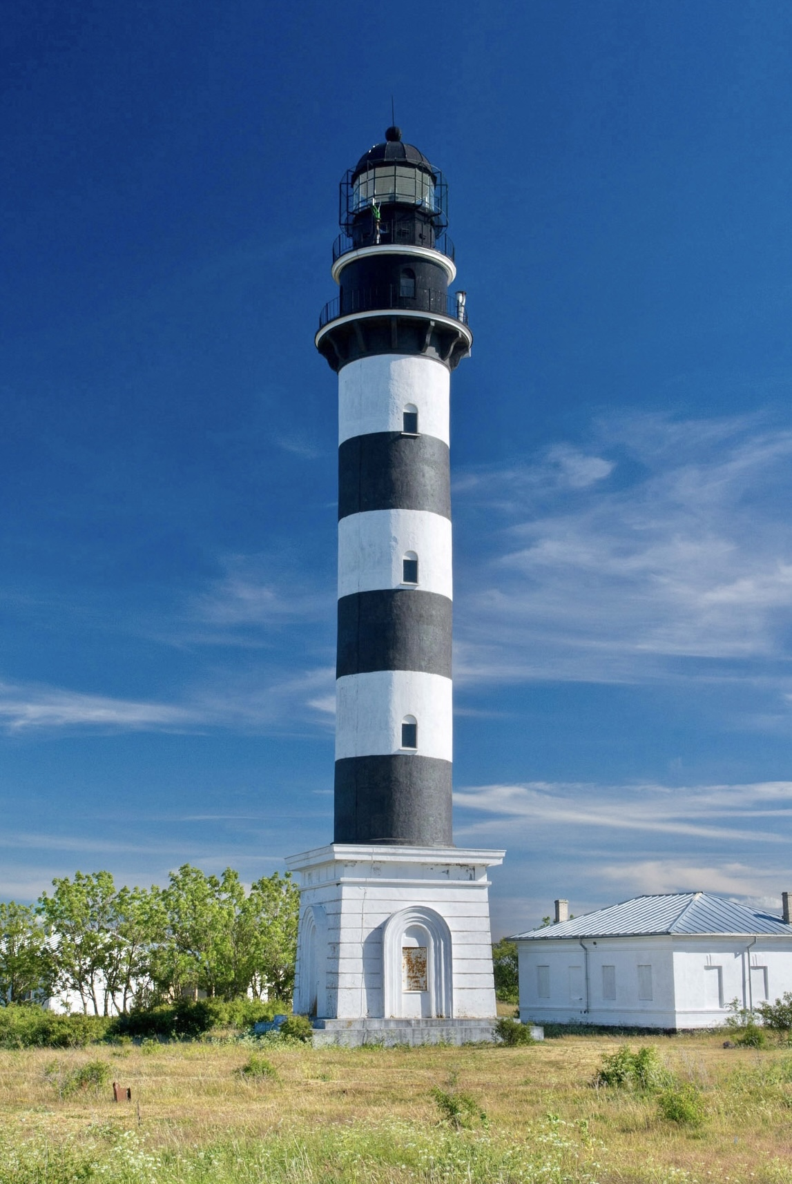 Osmussaare tuletorn